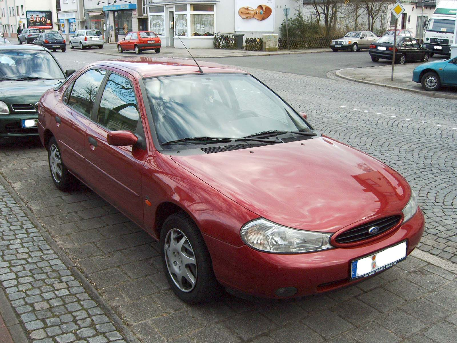 Ford Mondeo '97.